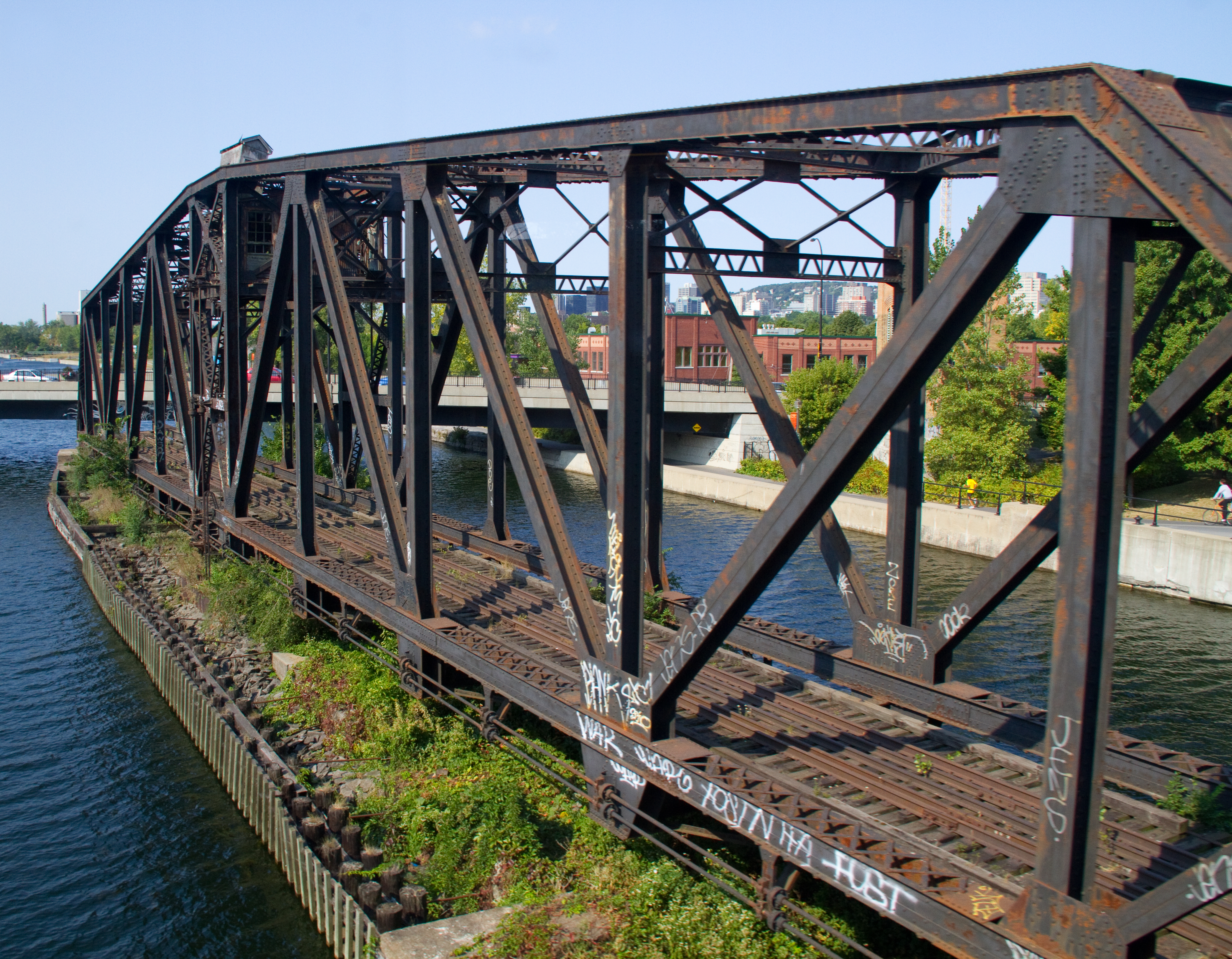 Ancien pont tournant, canal Lachine, Montreal